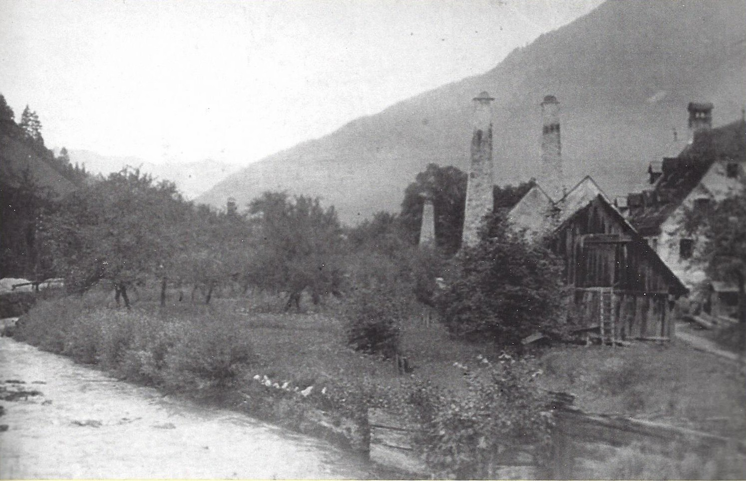 Der Kalchauhammer Dornleiten 18 am Hammerbach, der bis 1897 in Betrieb war.